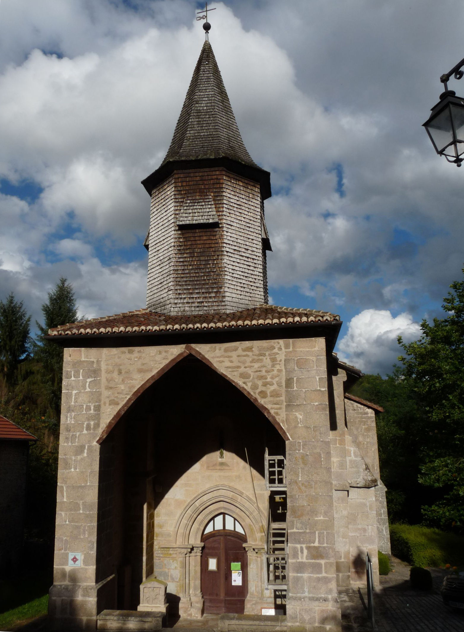 Église St Martial de Jabreilles-les-Bordes